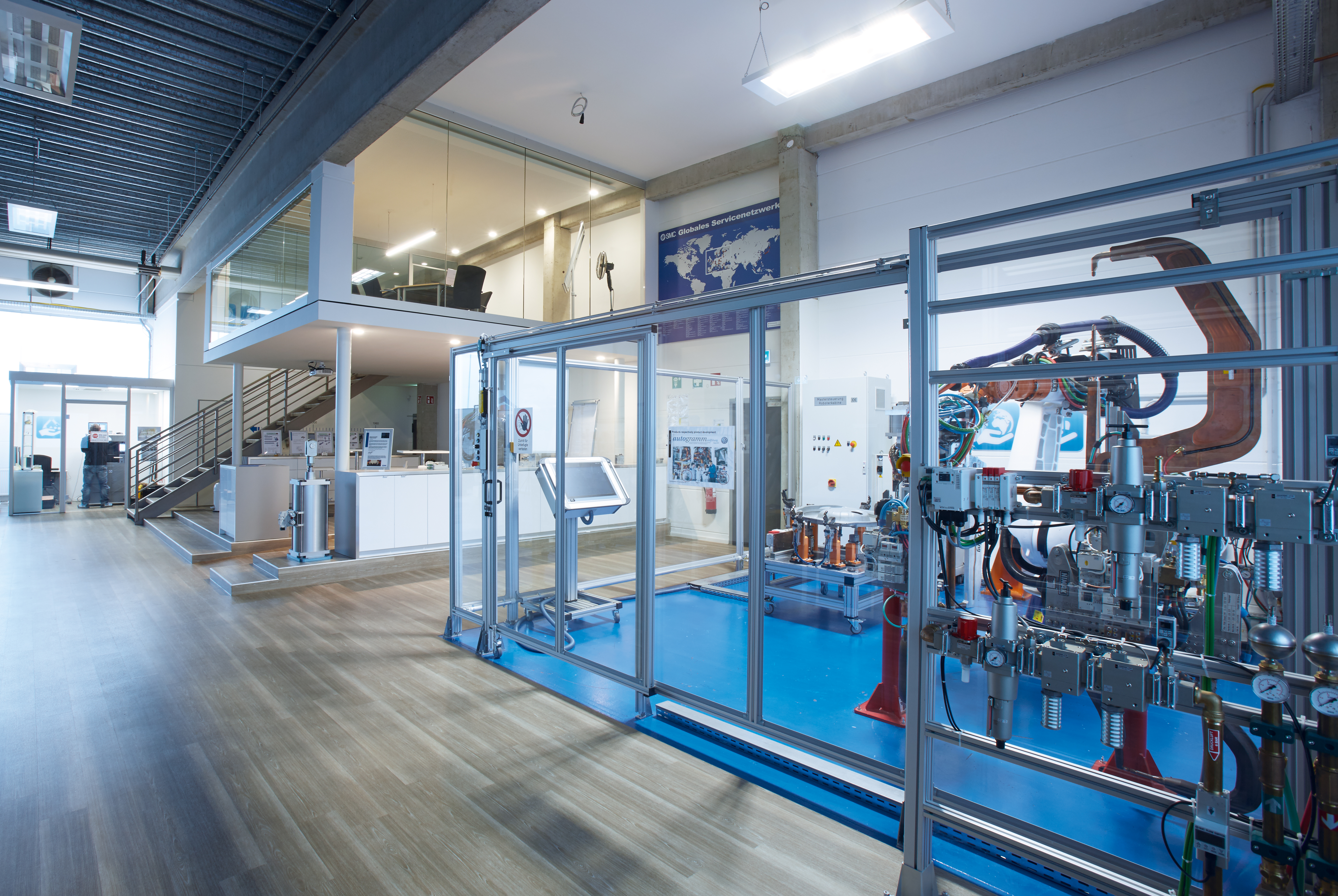 Industrial Application Center bei SMC Deutschland in Egelsbach